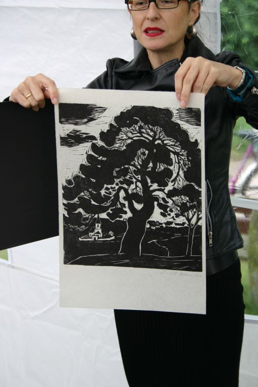 Susanne Klein präsentiert Eitel Kleins Bild "Die Föhre"